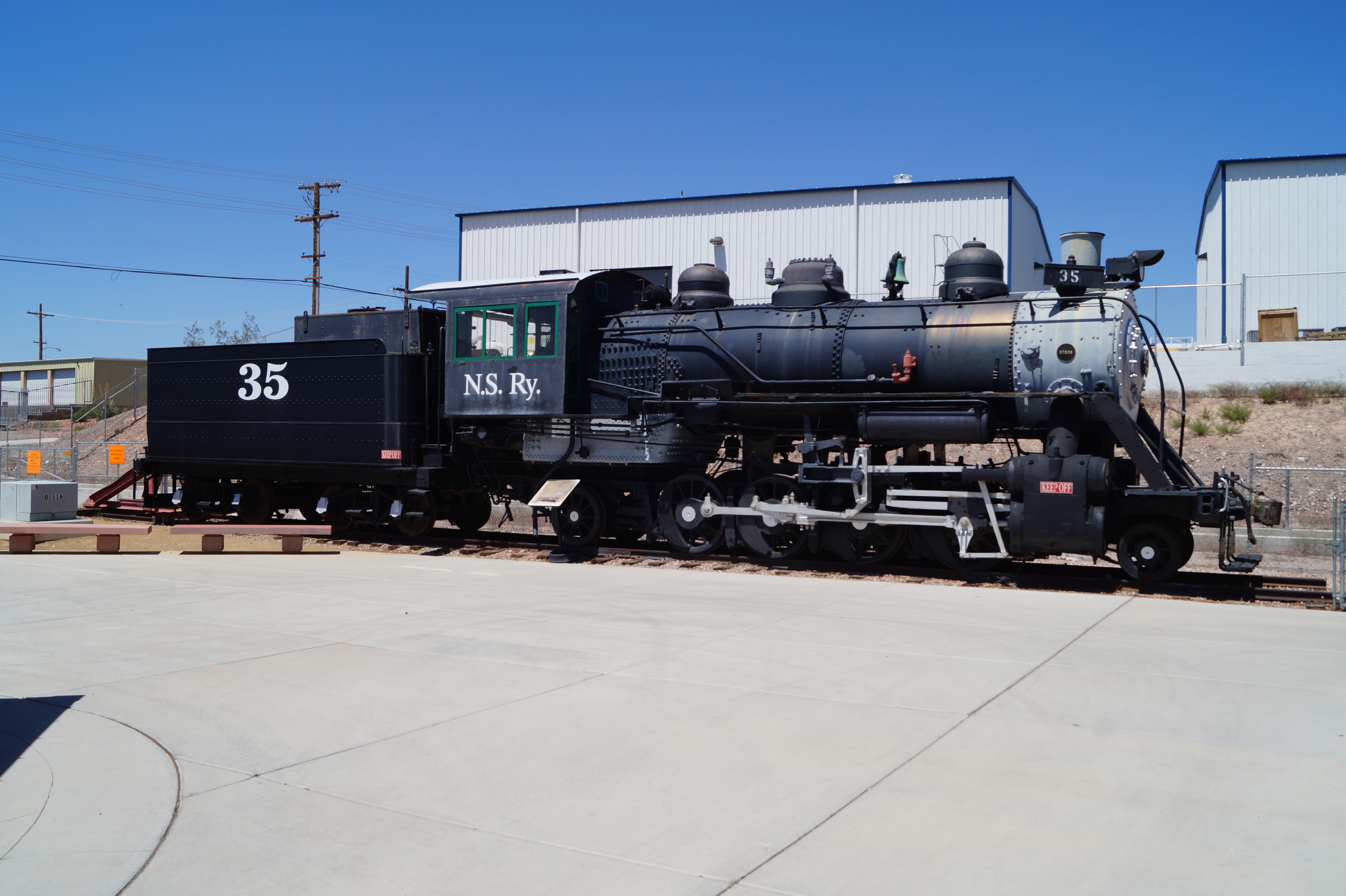 The Nevada State Railroad Museum which is an agency of the Nevada Department of Cultural Affairs. It is located at Yucca Street on the tracks of the historic Union Pacific Railroad branch Henderson-Boulder City near the former Boulder City Railroad Yards where the Hoover Dam construction equipment was unloaded in the 1930s.